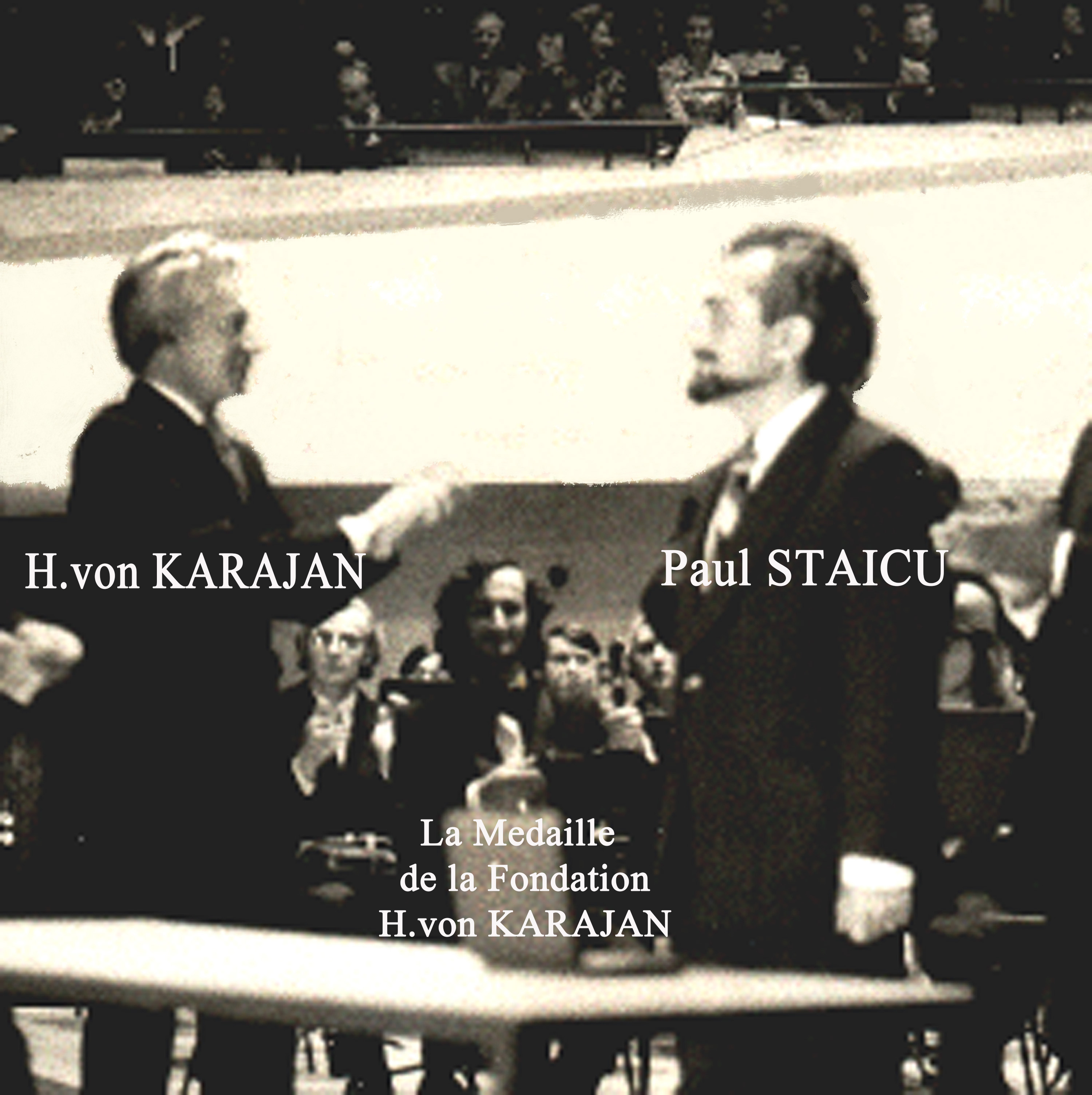 Berlin 1974 - MEDAILLE Karajan remettre à Paul Staicu